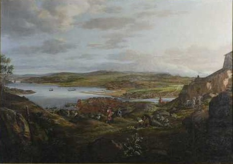 Prospekt av Halden Tilhører Norsk Folkemuseum